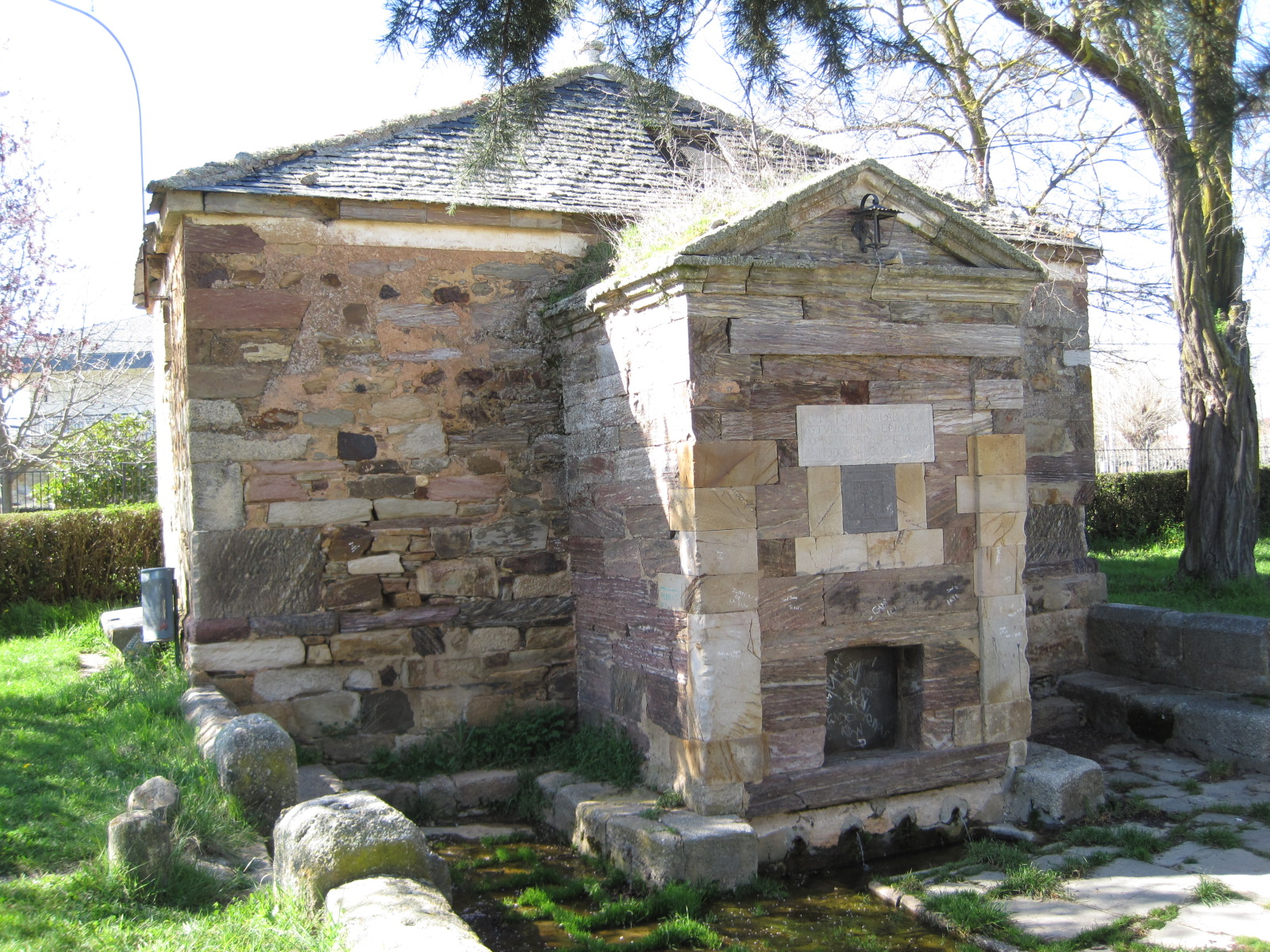 Fuente Encalada, en Astorga (León, España).